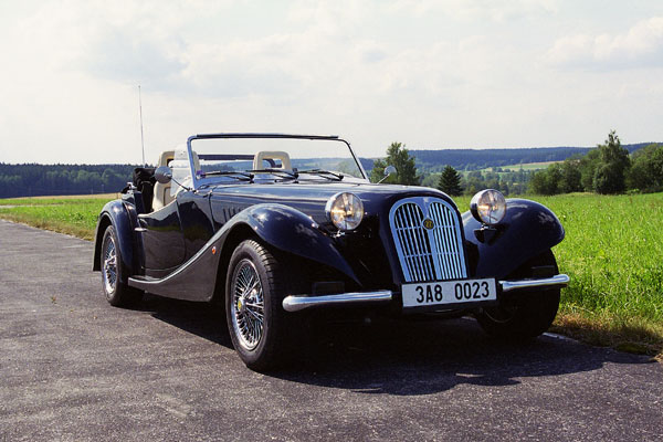 Automobil Gordon